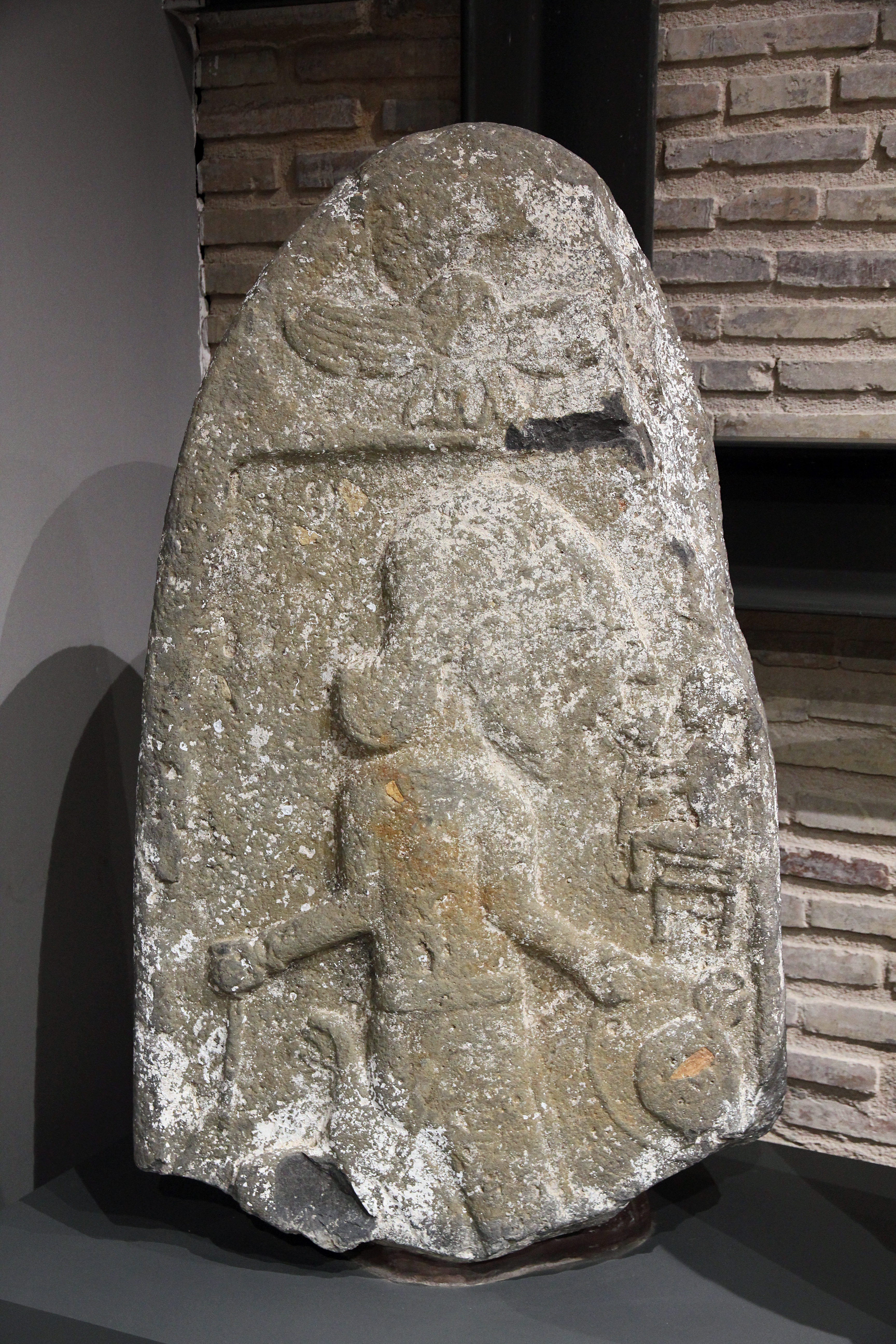 Archäologisches Museum Adana, Südtürkei, späthethitische Stele aus Yumurtalık